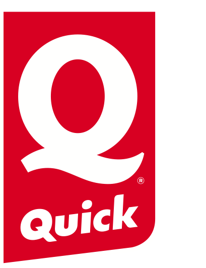 Logo Quick depuis Janvier 2015